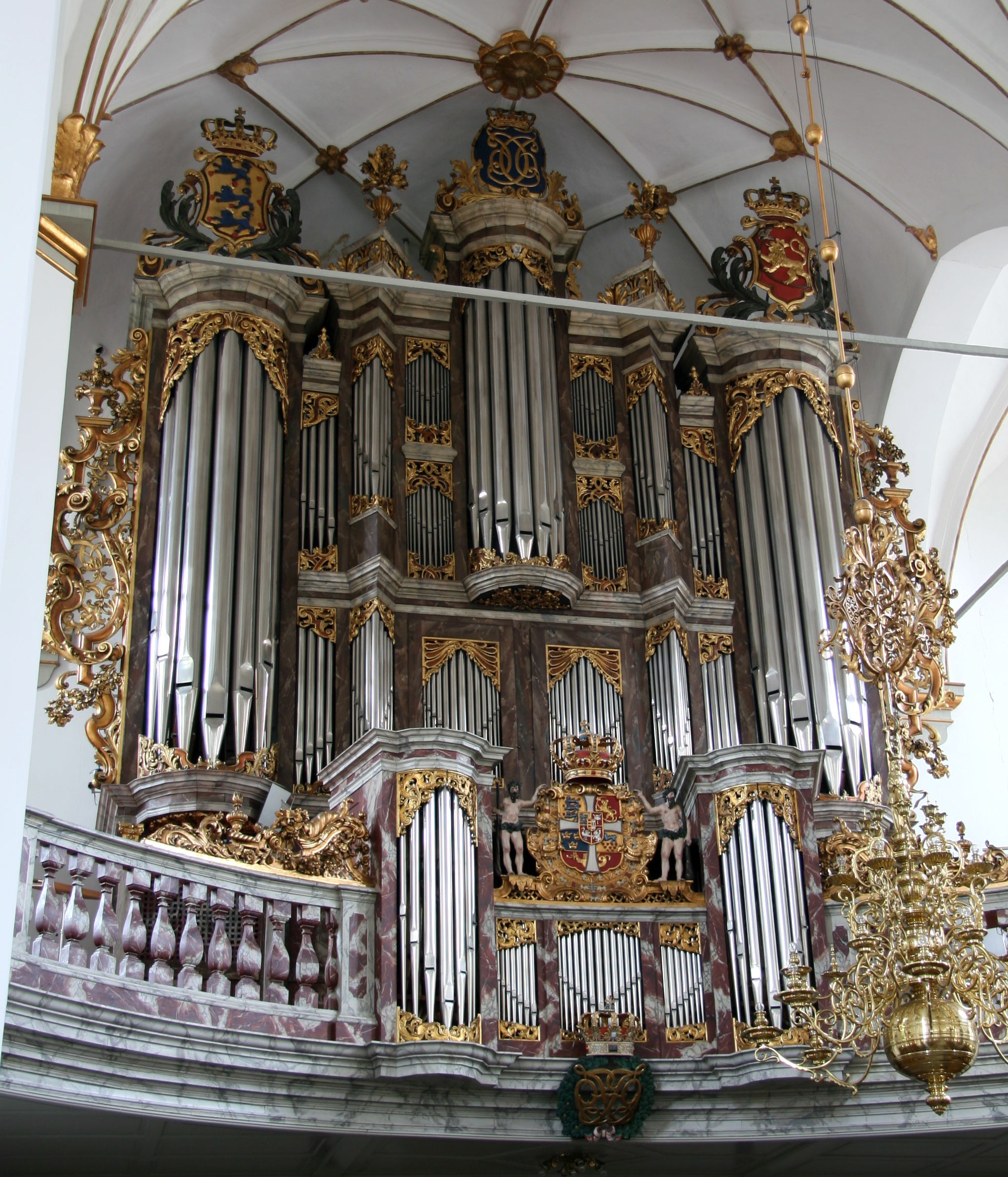 Trinitatis Kirke, Copenhagen, Denmark. Hovedorgel.